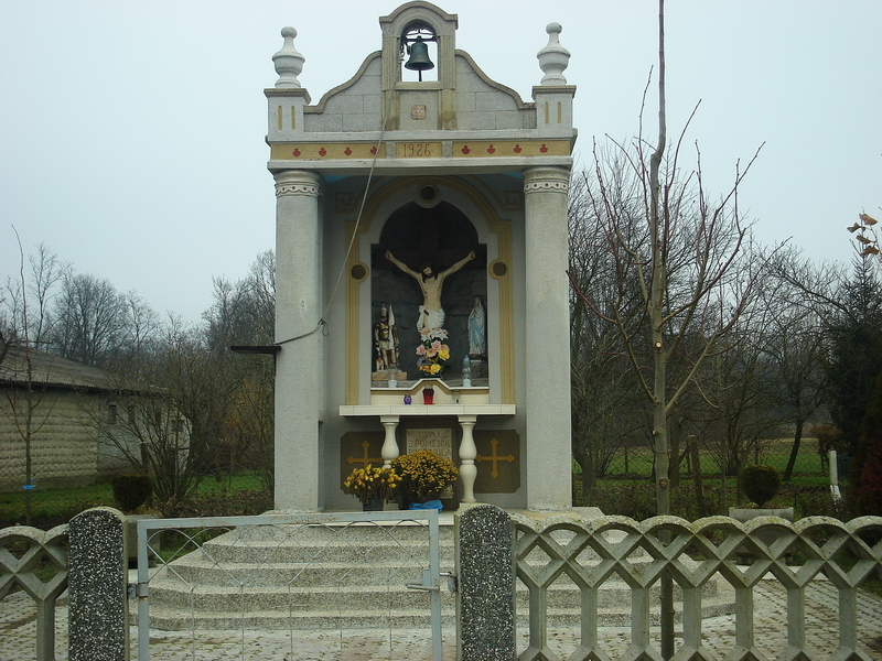 Pirakovec - Raspelo